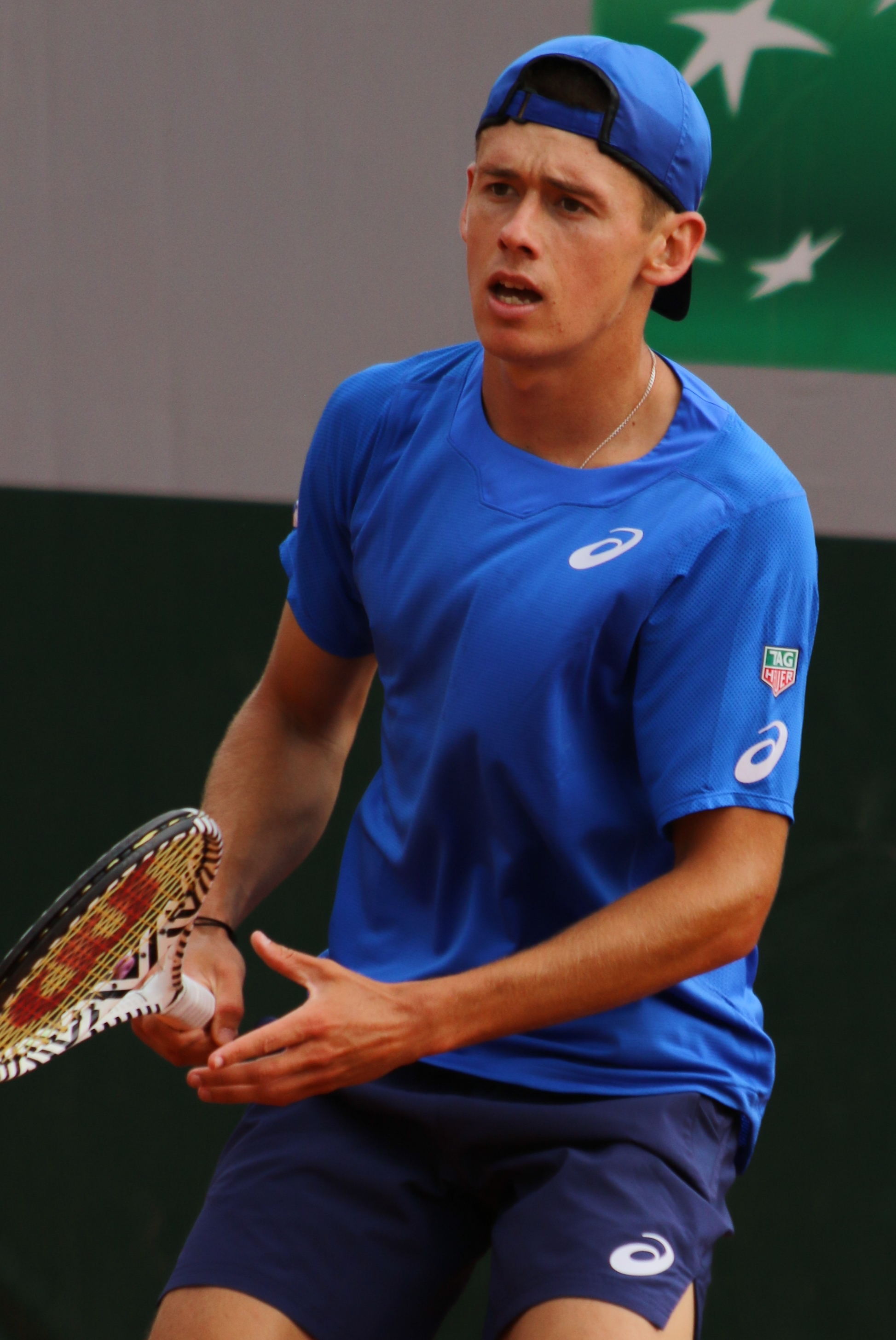 de Minaur RG19 (23)